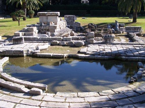 Gymnasium Syracusae